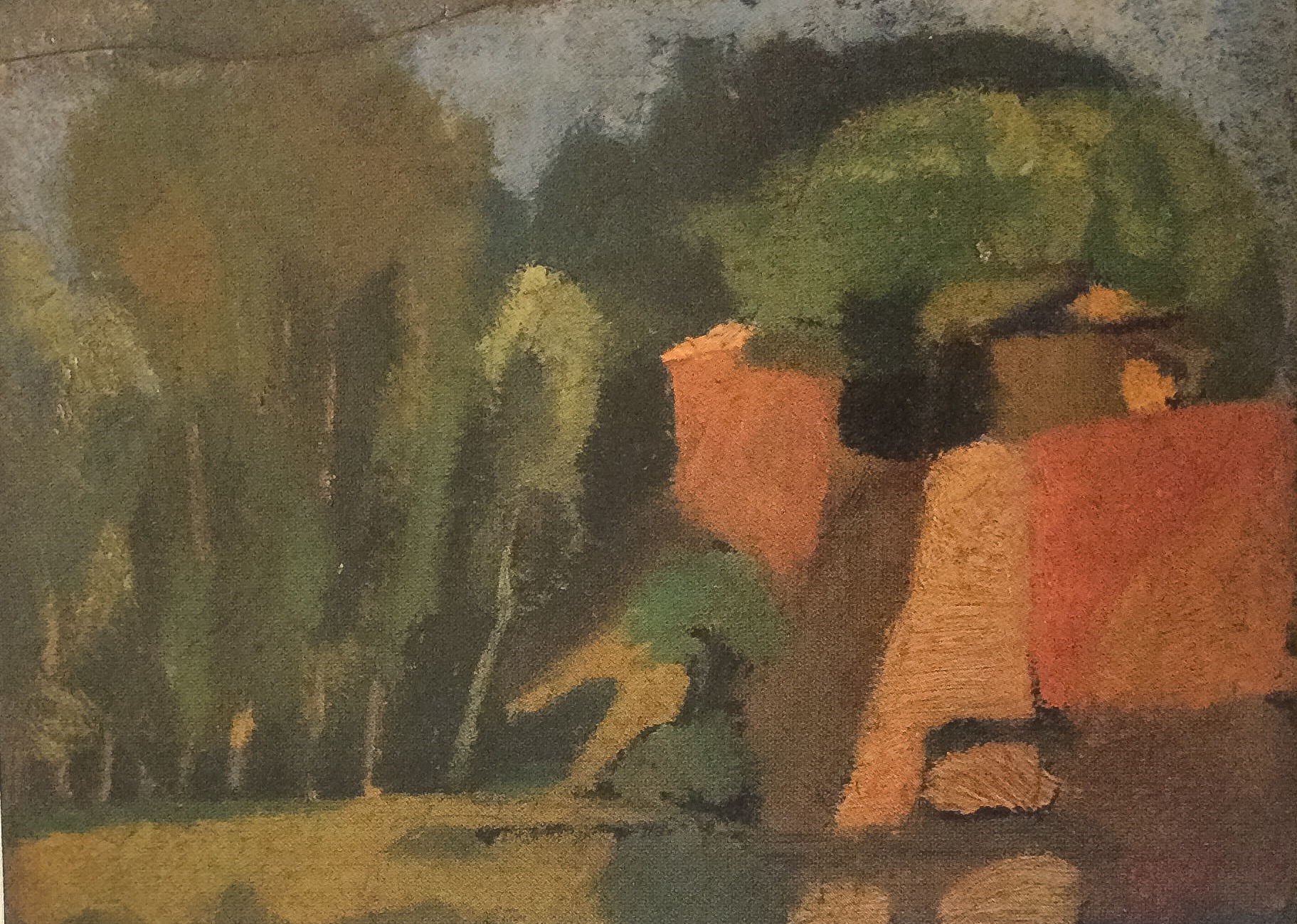 1916, Fondazione Montanelli Bassi